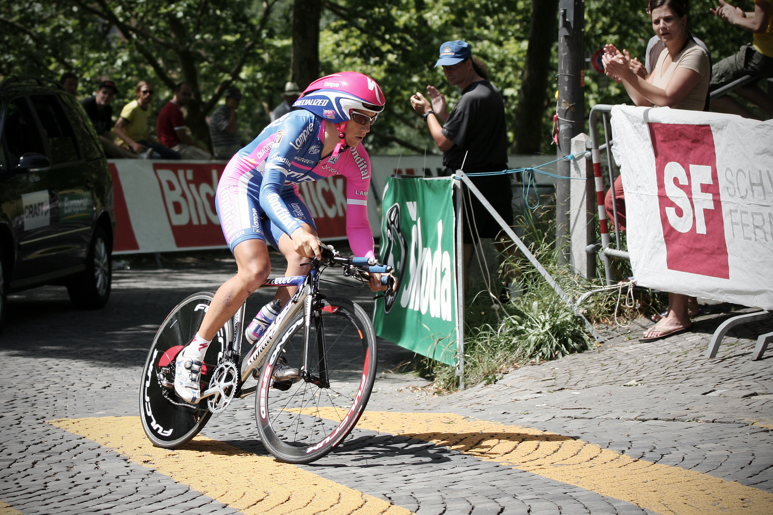 David Loosli, Bern, Switzerland (Einzelzeitfahren Tour de Suisse 2007)